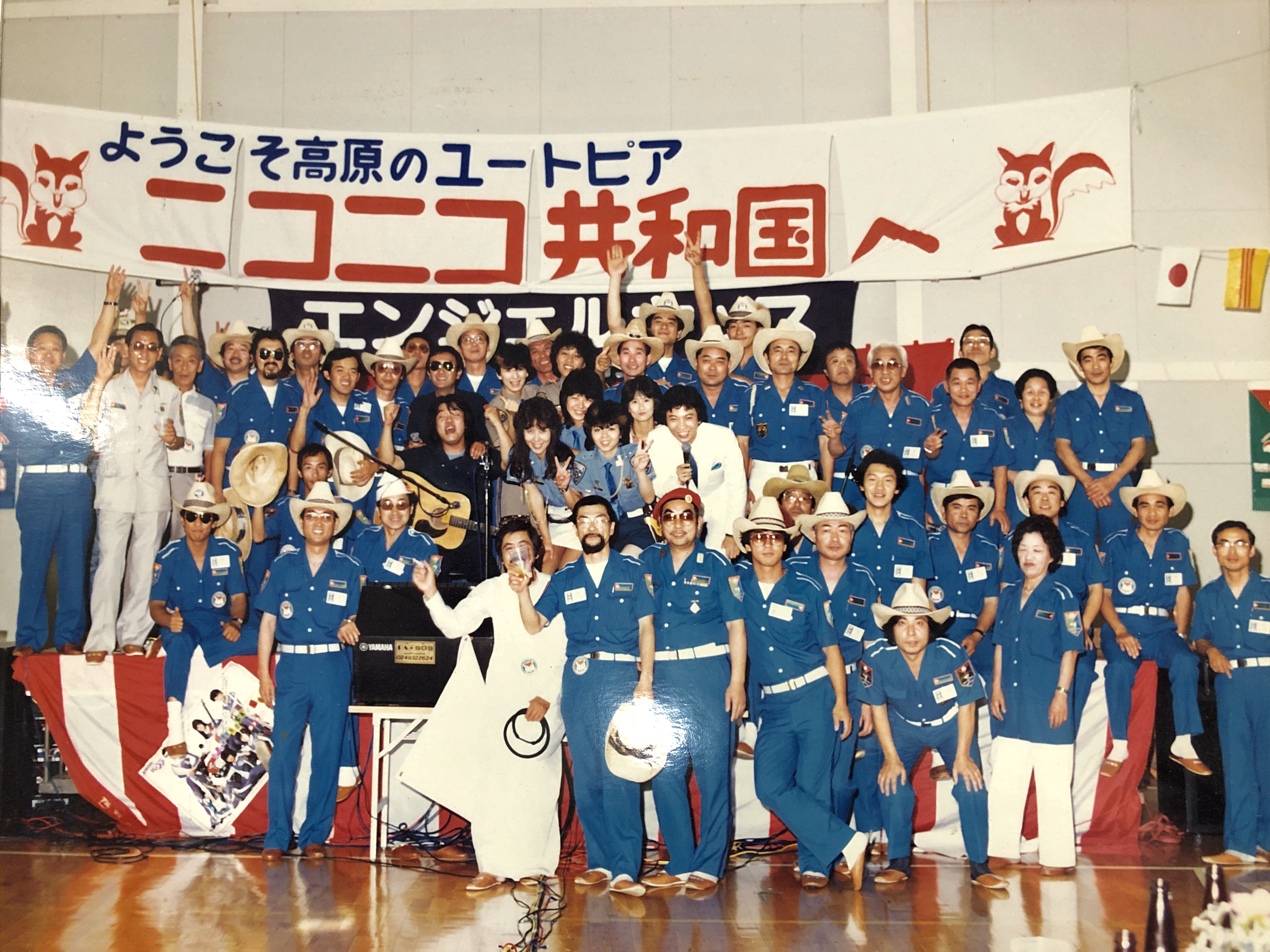 ニコニコ共和国に関する写真